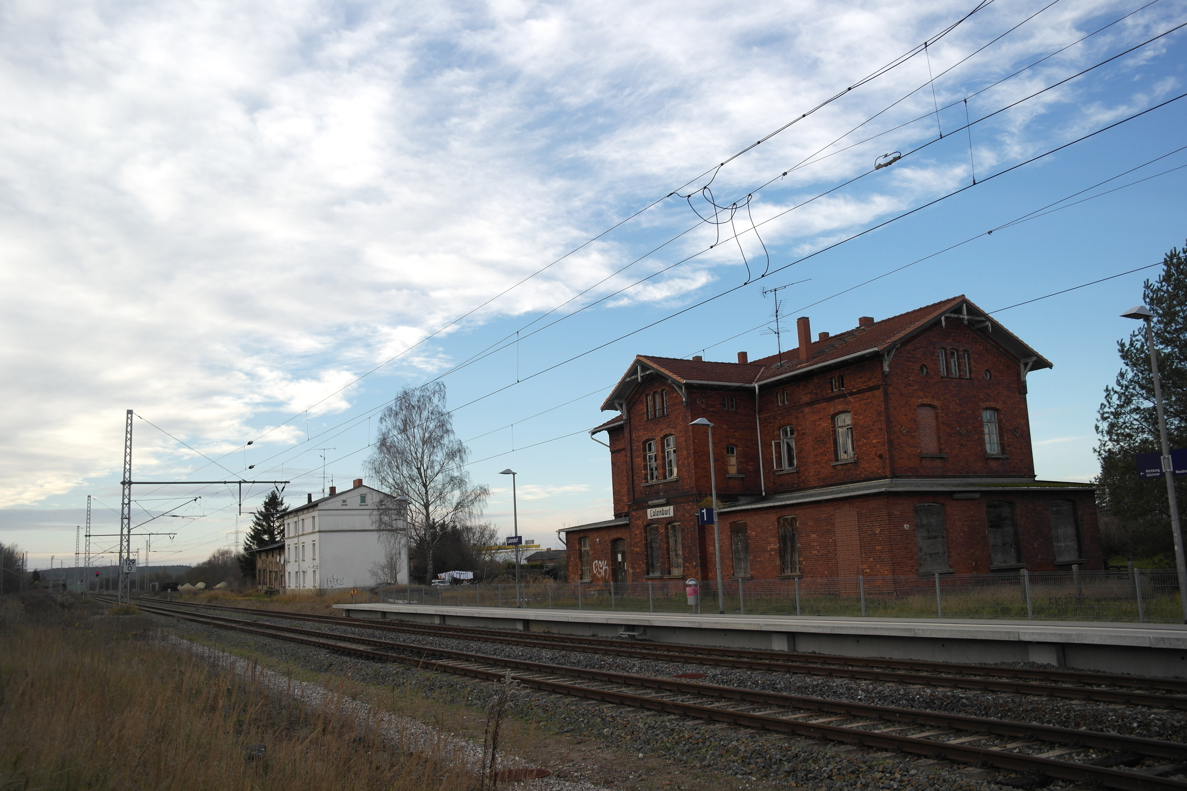 Bahnhof Lalendorf, Empfangsgebäude (Baudenkmal) mit Bahnsteig, im Hintergrund denkmalgeschütztes Wohnhaus